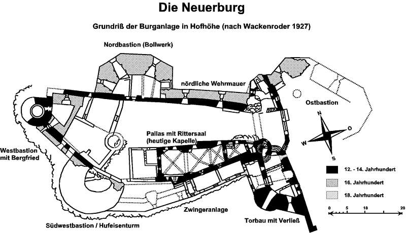 Grundriss 88.134.58.25 17:17, 2. Mär 2006 (CET) der Burg Neuerburg Autor: Martin Brunker 2004